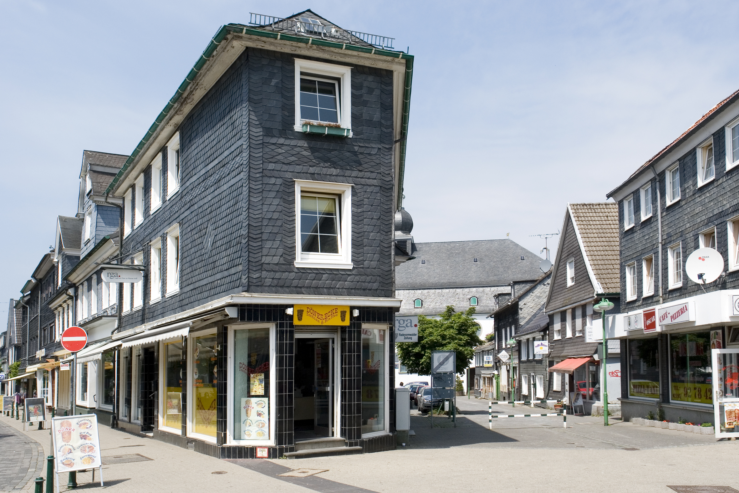 Radevormwald, Am Marktplatz